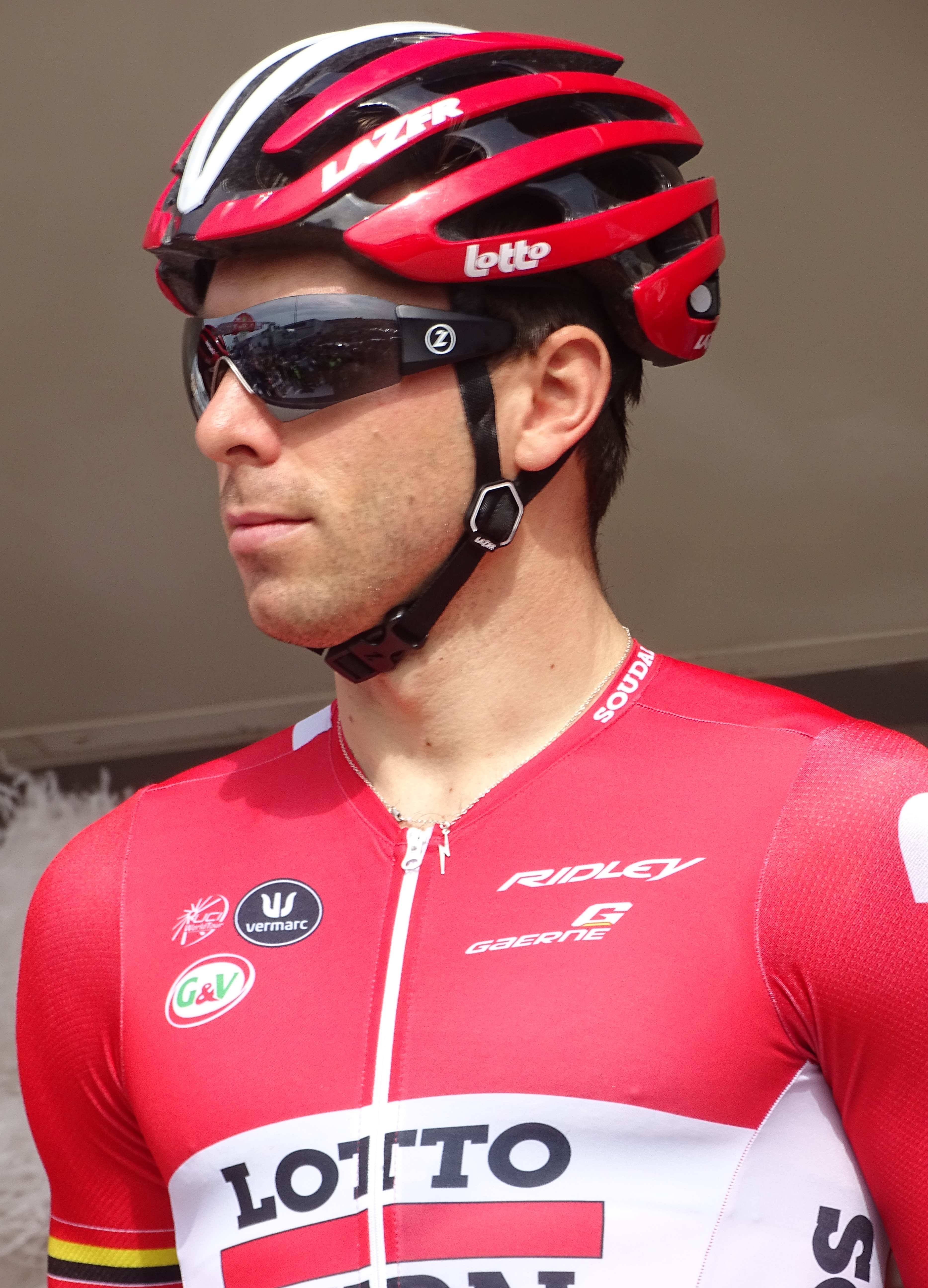 Reportage réalisé le jeudi 16 avril à l'occasion du départ et de l'arrivée du Grand Prix de Denain 2015 à Denain, Nord, Nord-Pas-de-Calais, France.